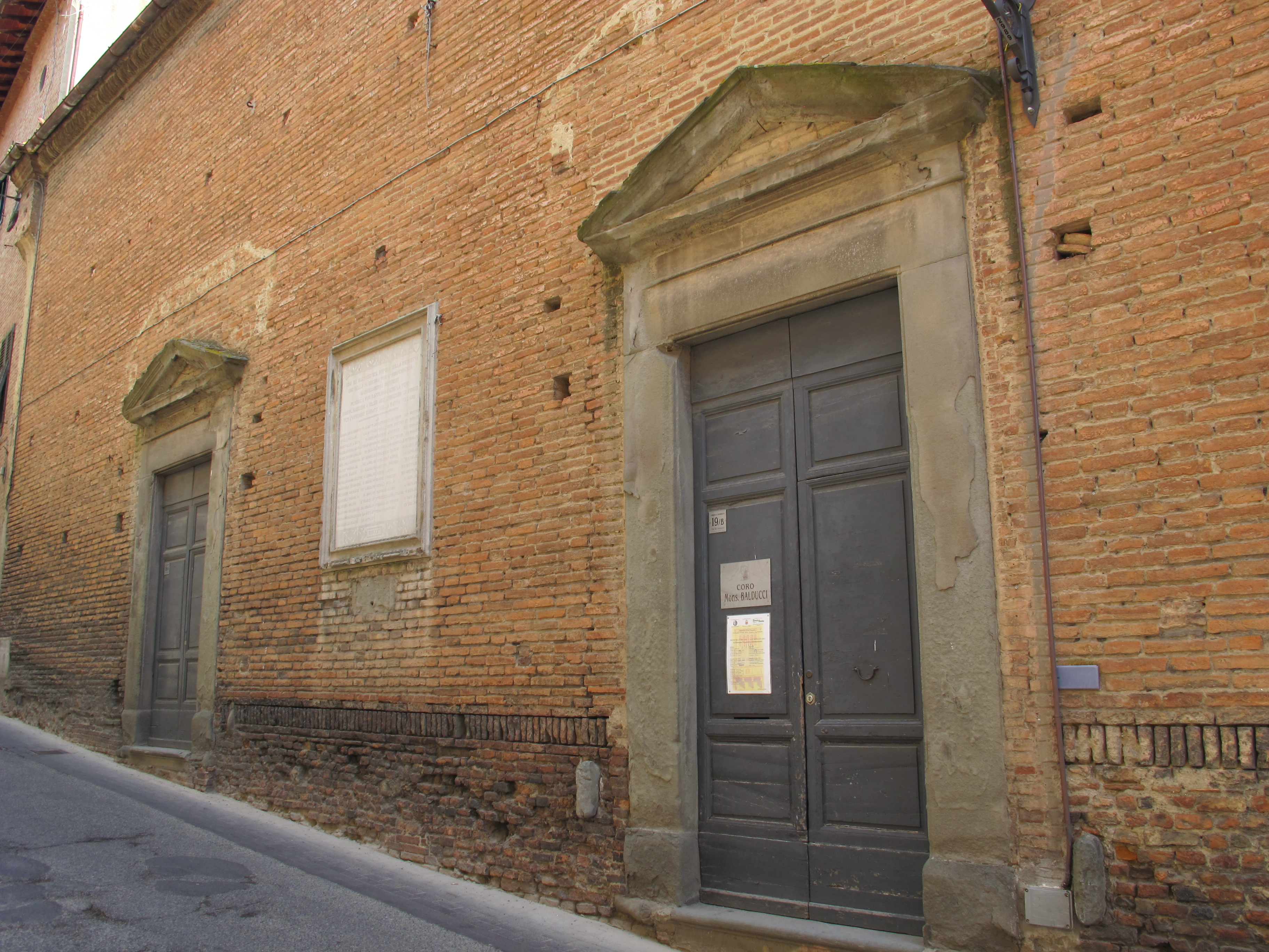 San miniato, ex oratorio della crocetta